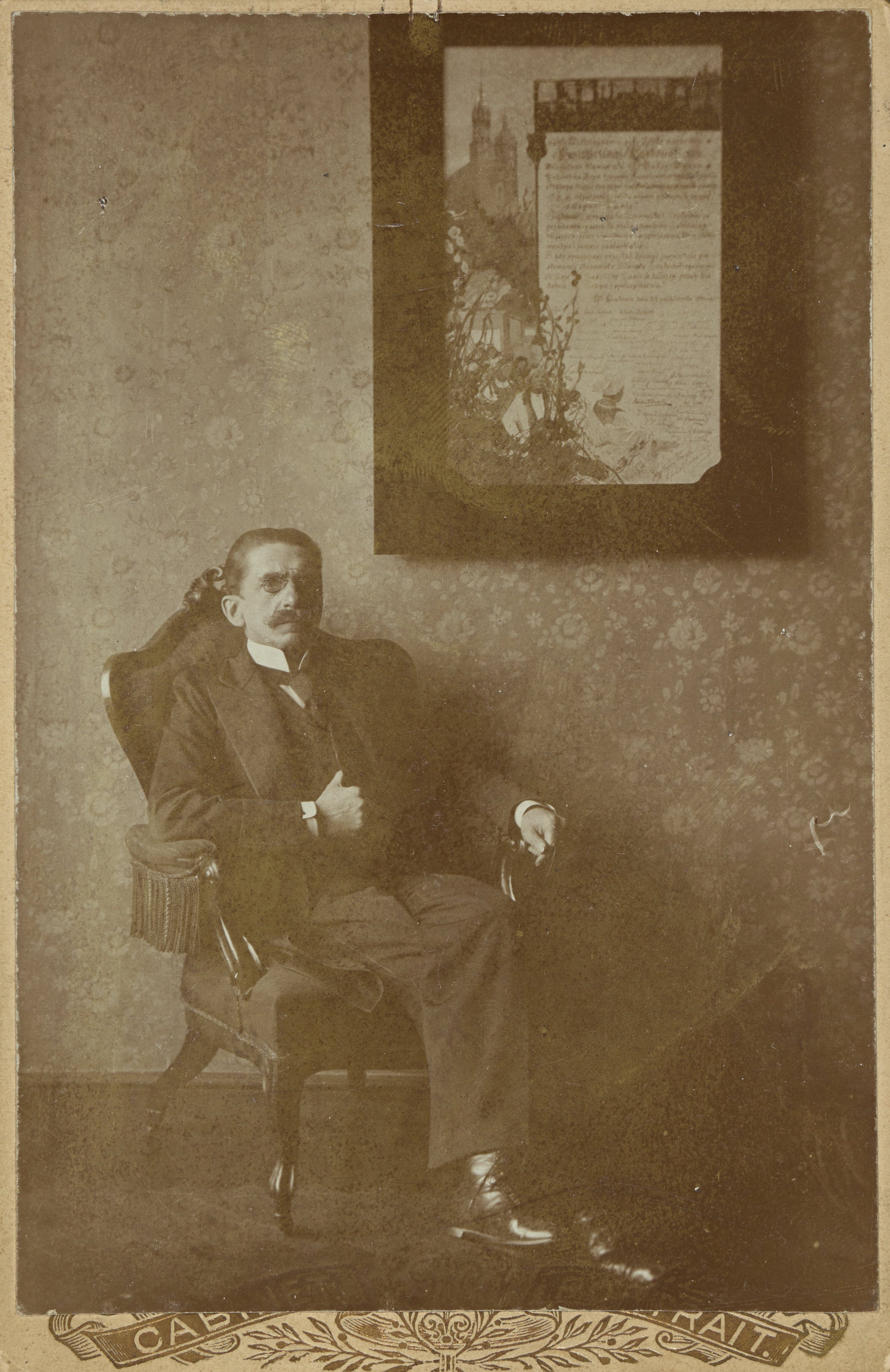 Kazimierz Piotr Laskowski